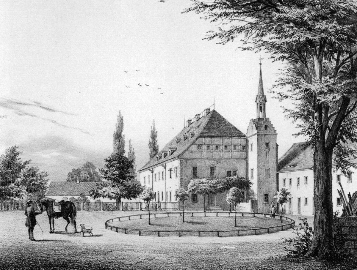 Schloss Ehrenberg bei Waldheim um 1860